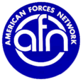 Das Bild zeigt das alte Logo des American Forces Network